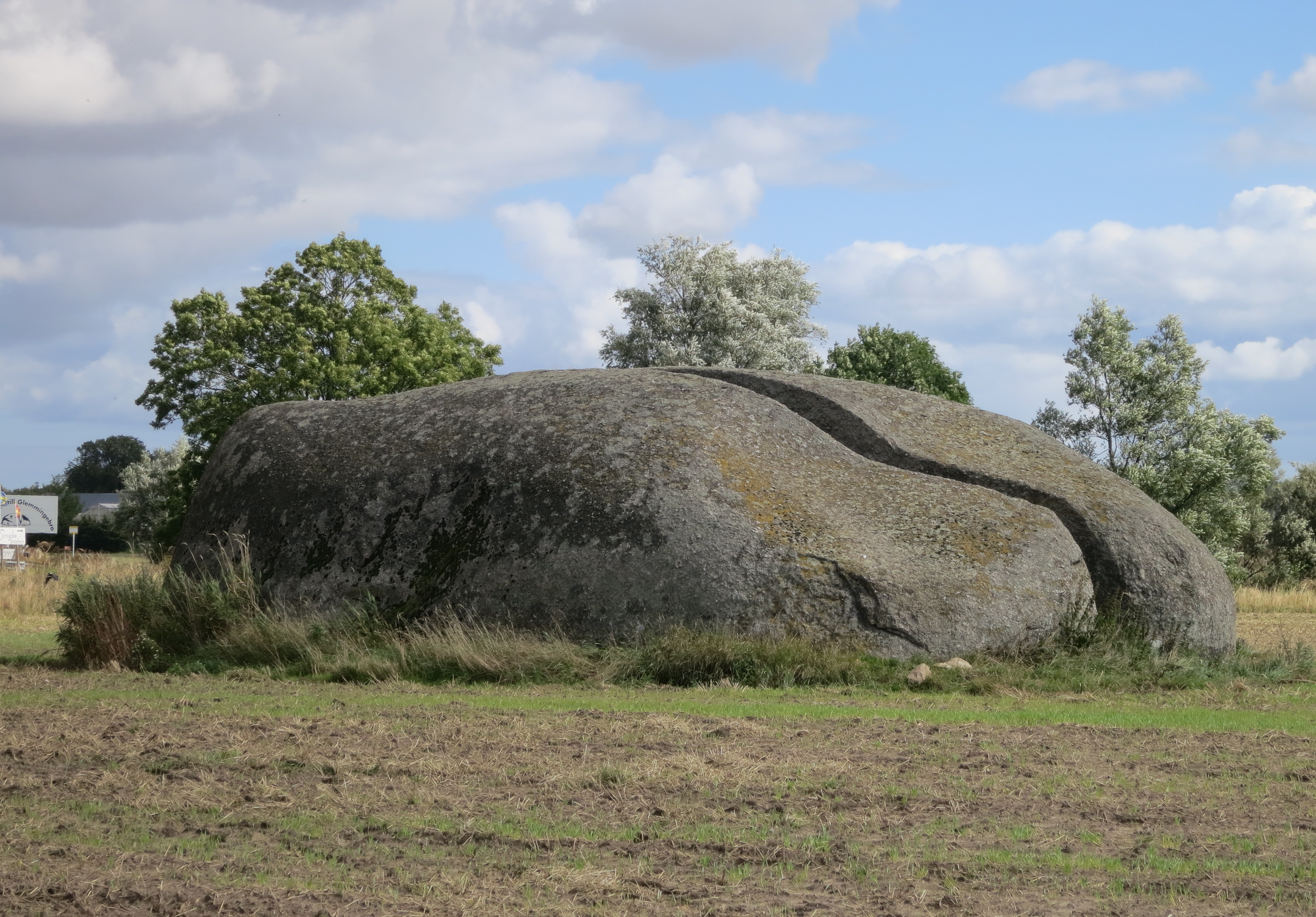 Klövasten i augusti 2014